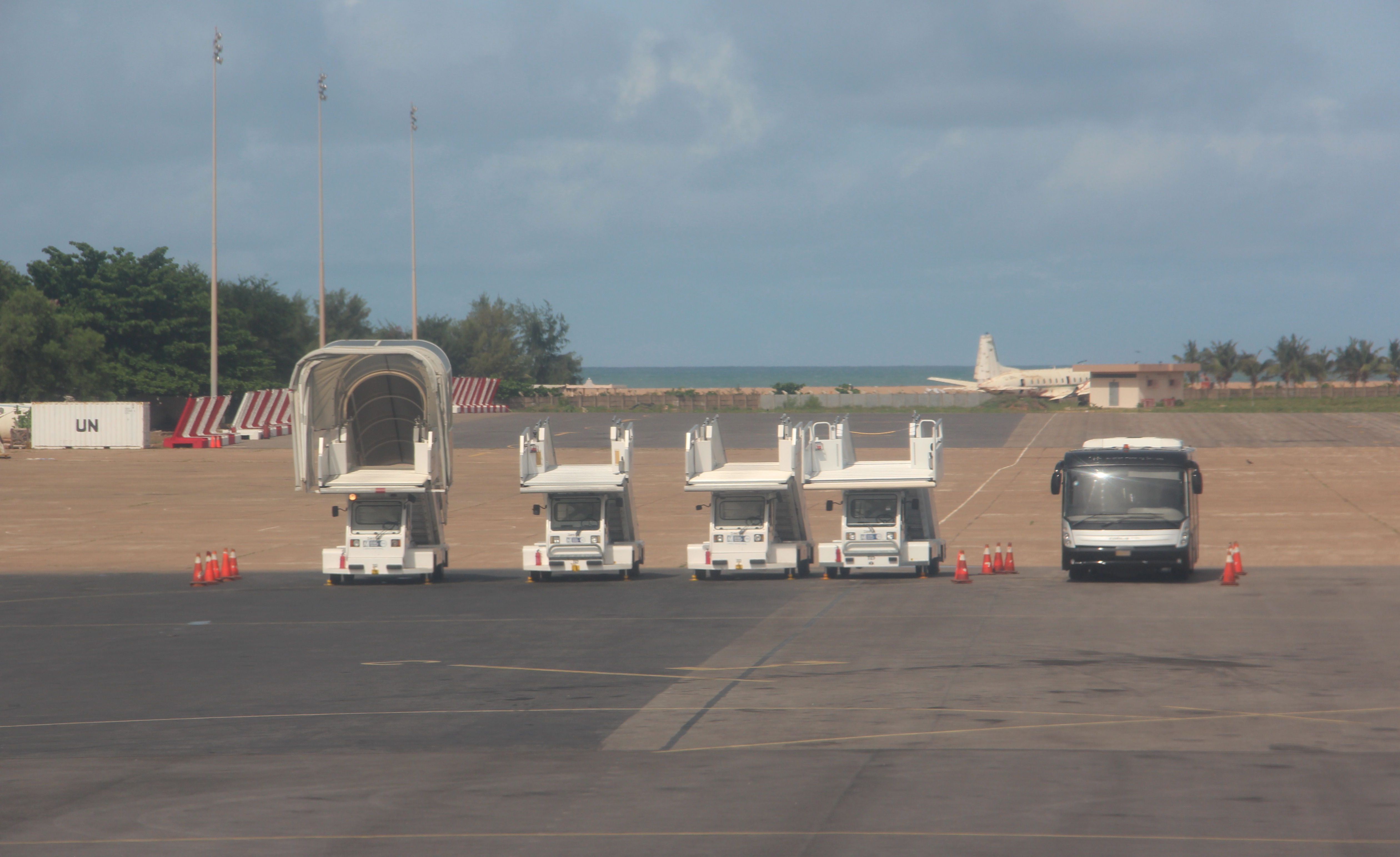 Aéroport de Cotonou. This is an image with the theme "Africa on the Move or Transport" from: Benin